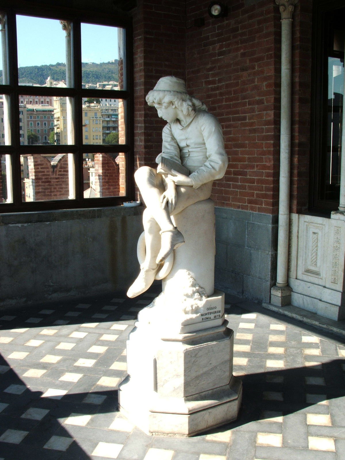 Immagine dalla città di Genova - Castello d'Albertis, Museo delle Culture del Mondo - Loggia, statua del "Colombo giovinetto", di Giulio Monteverde.